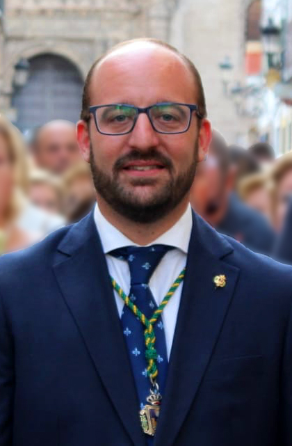 German Beardo Caro en una imagen tomada el 23 de junio de 2019